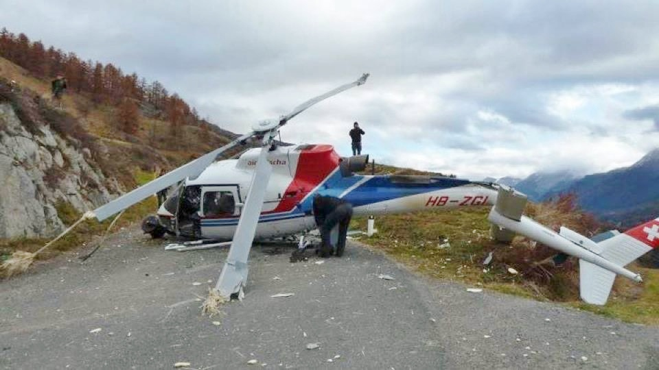 helicopter crash 2011 zuoz